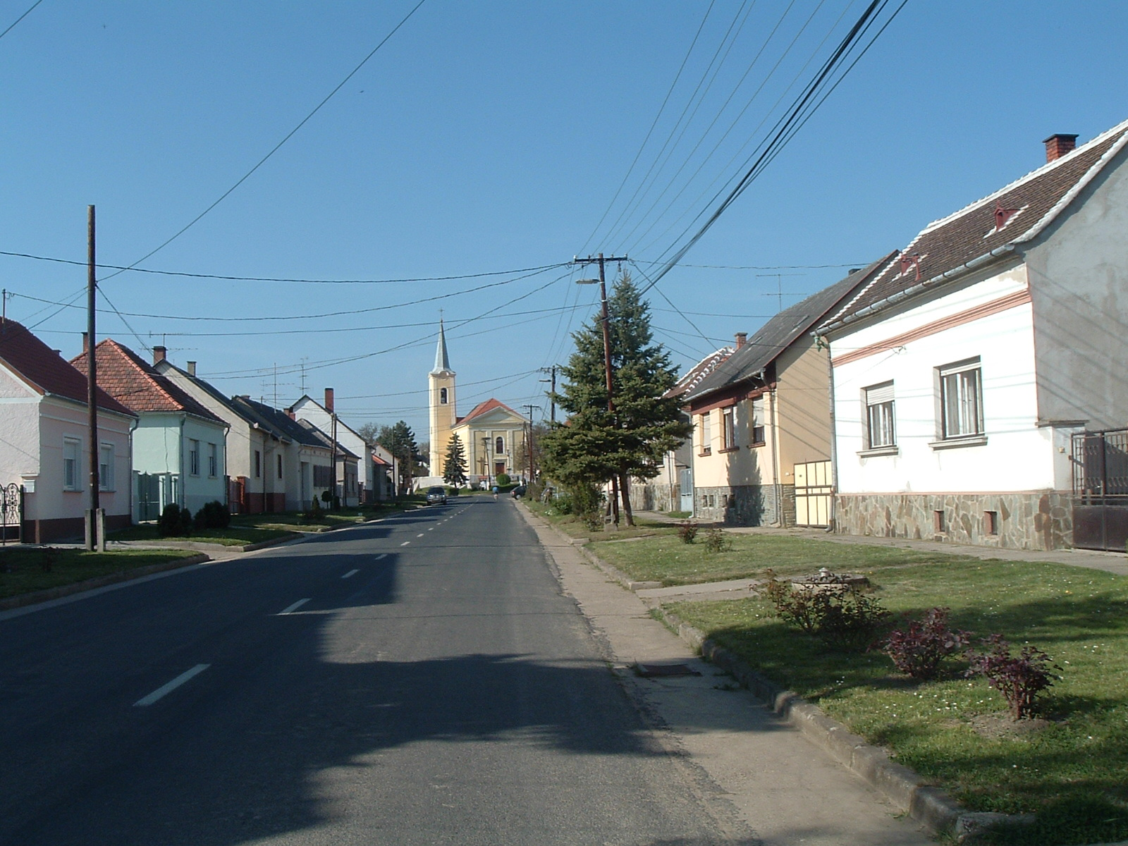 Felsőcsatár, Church